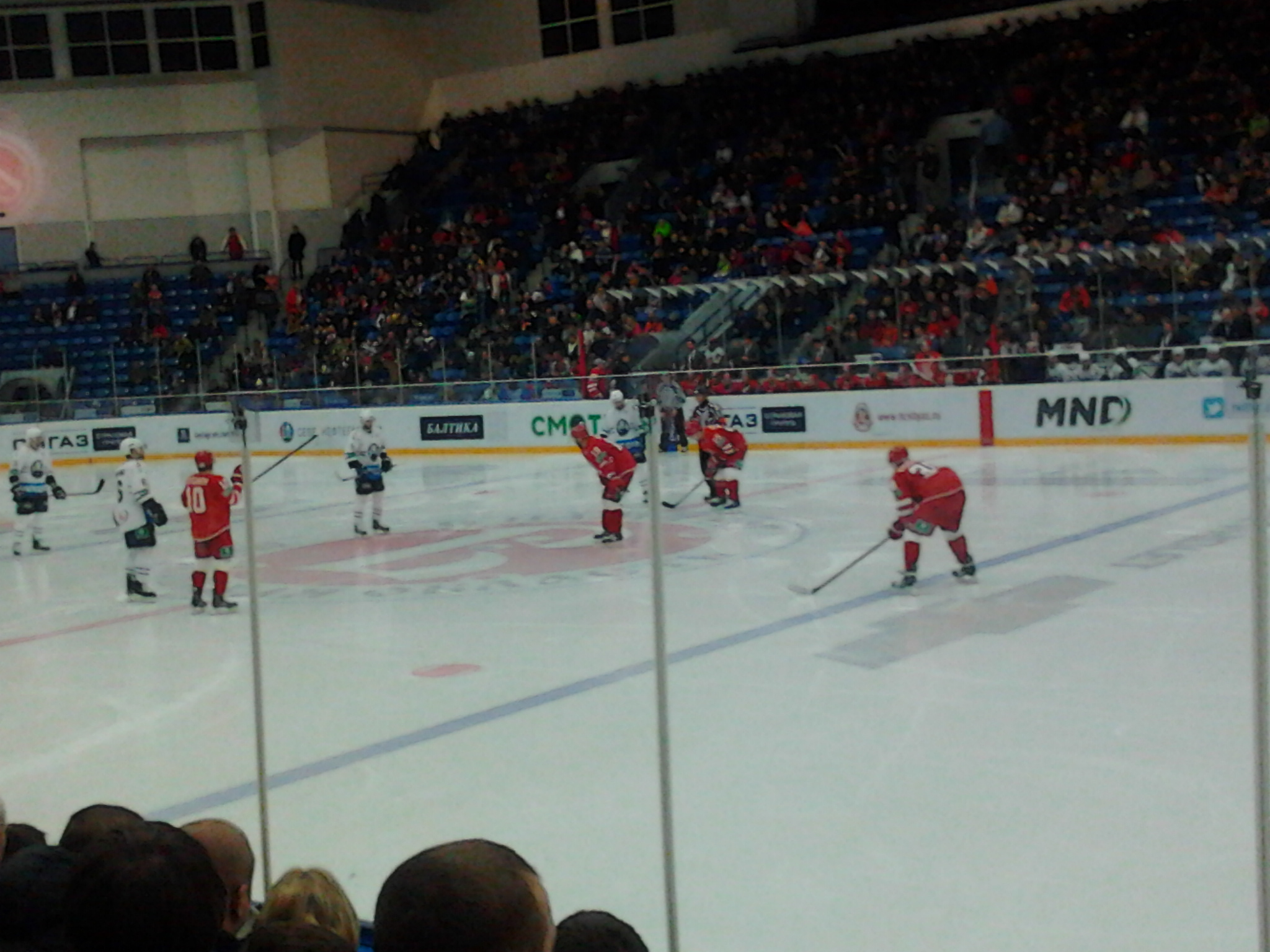 Хоккейный матч